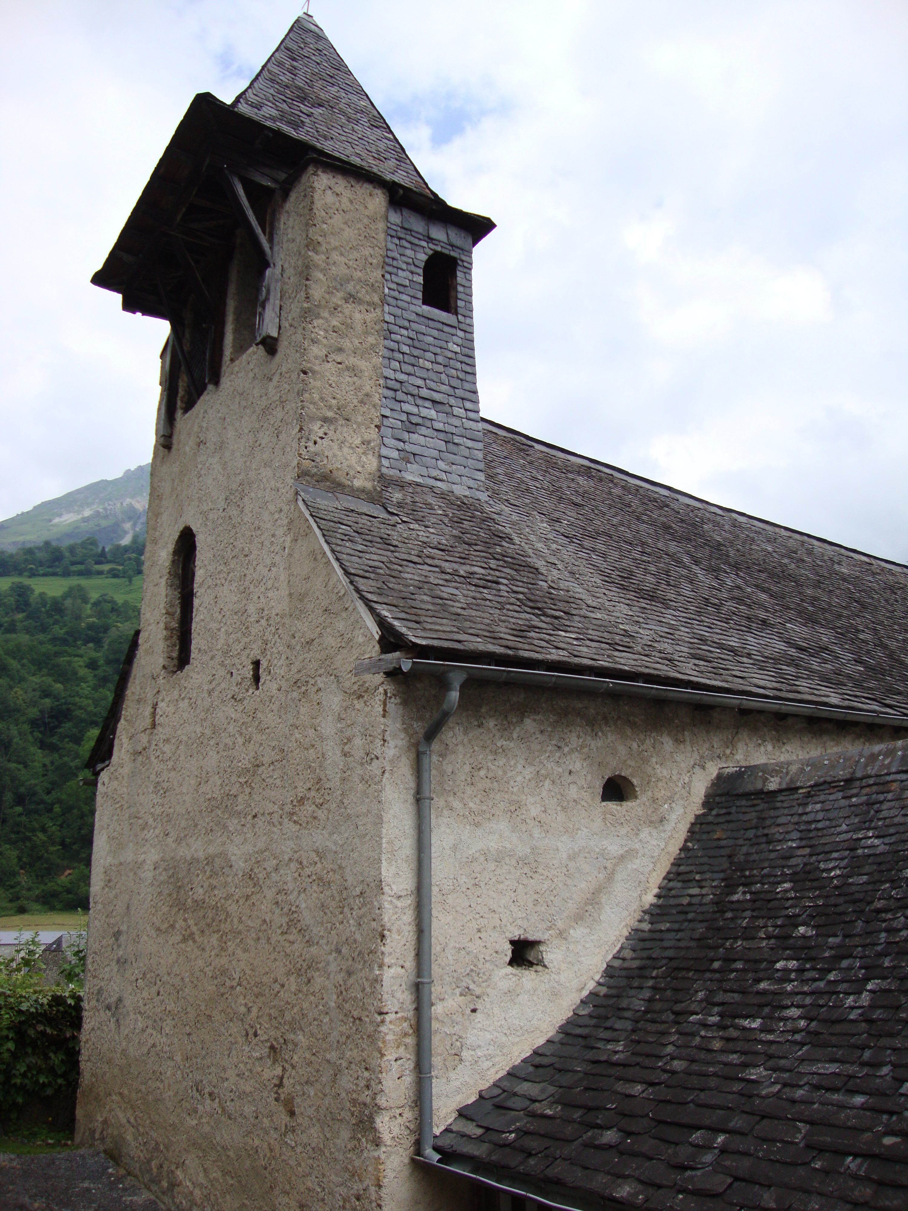 Orcun (Bedous, Pyr-Atl, Fr) chapelle, le clocher-mur avec sa caisse de resonance formant tour